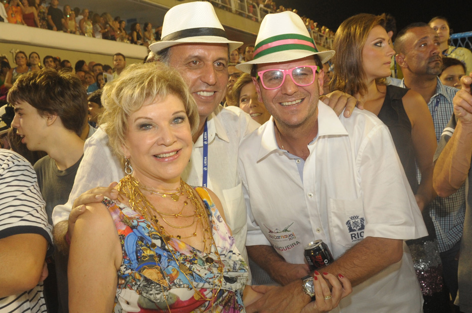 "A Ministra da Cultura, Marta Suplicy, encerrou sua participação no Carnaval 2013 assistindo ao desfile das escolas de samba do grupo especial no Rio de Janeiro acompanhada do prefeito Eduardo Paes."